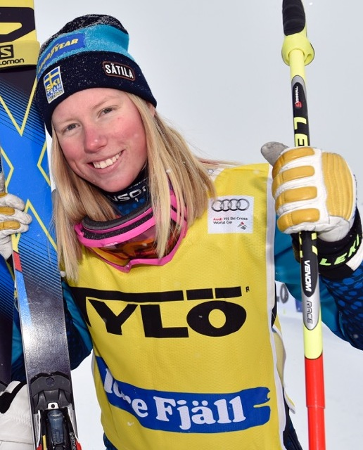 Sandra Näslund, efter att ha slutat trea i världscuptävlingarna i Idre Fjäll 2016.